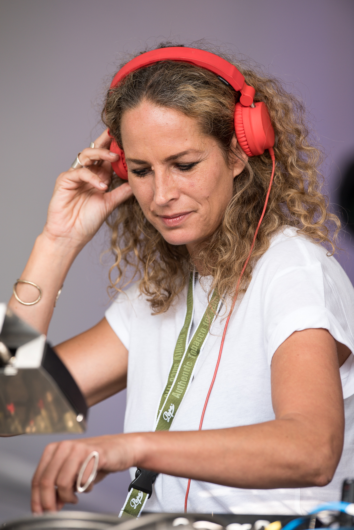 Festival,Konzert,Lakestage,Livekonzert,Livemusik,Monika Kruse,Musik,Open Beatz 2016